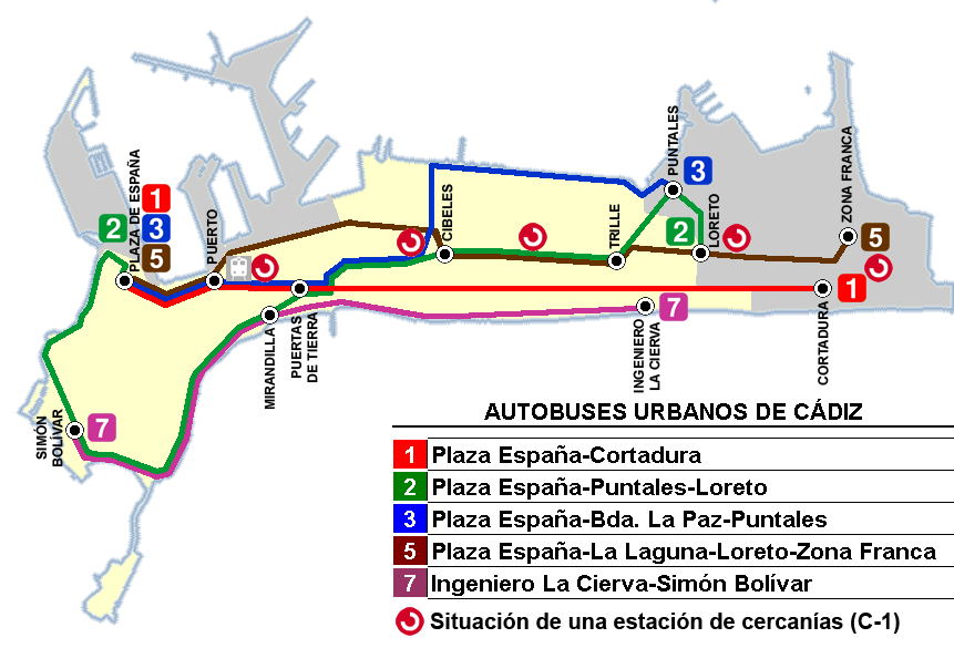 Líneas de autobús urbano de Cádiz.